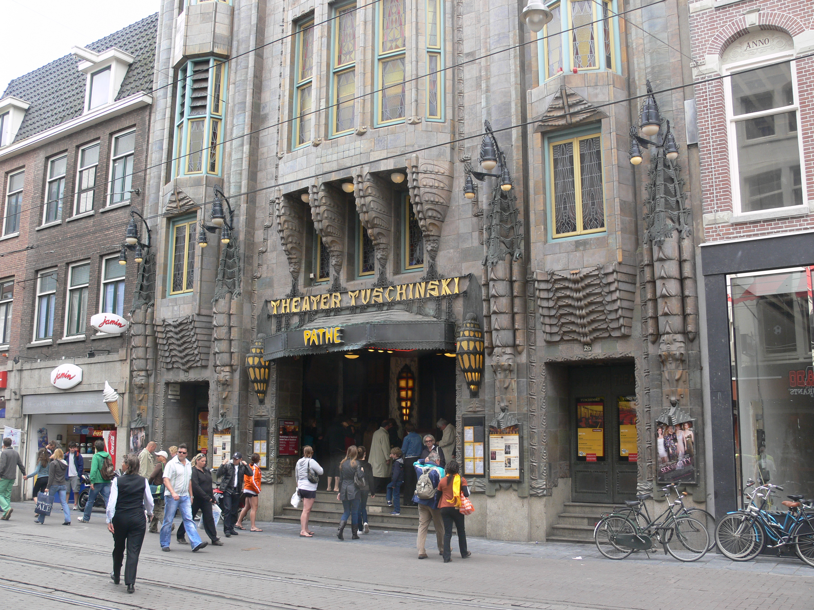 Tuschinski Theater, Reguliersbreestraat, Amsterdam